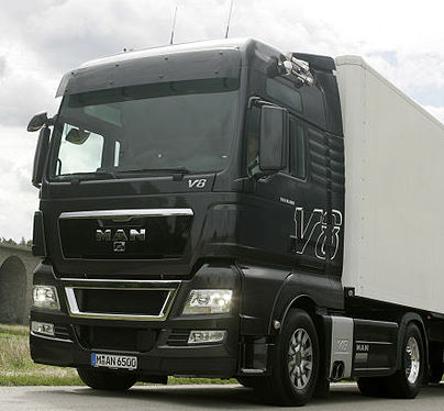 MAN TGX Fahrerhaus (Bild bearbeitet und wieder hochgeladen).